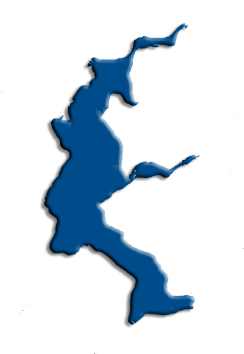 Mapa de la Laguna Victoria, en el departamento del Beni, Bolivia.